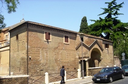 Parete della Basilica di San Clemente Roma